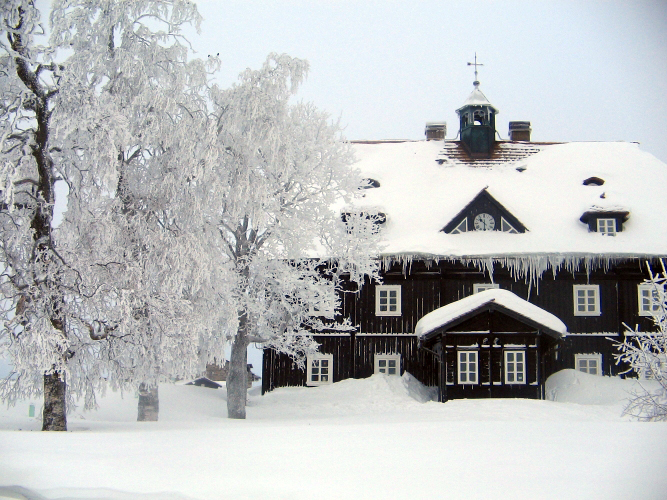 Pansky dům (eheml. Herrenhaus in Jizerka)